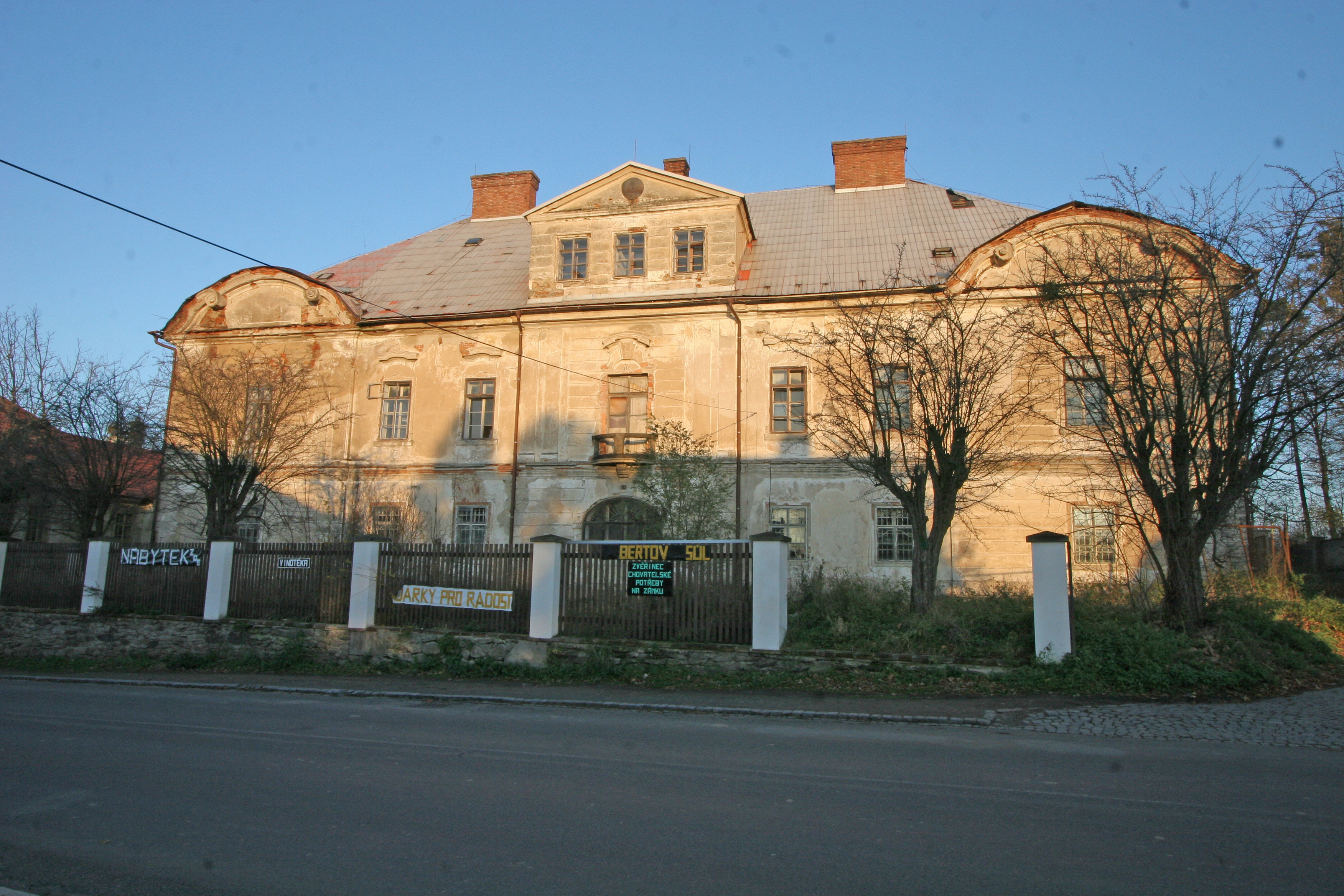 Starý a nový zámek, 5. května 2, Golčův Jeníkov